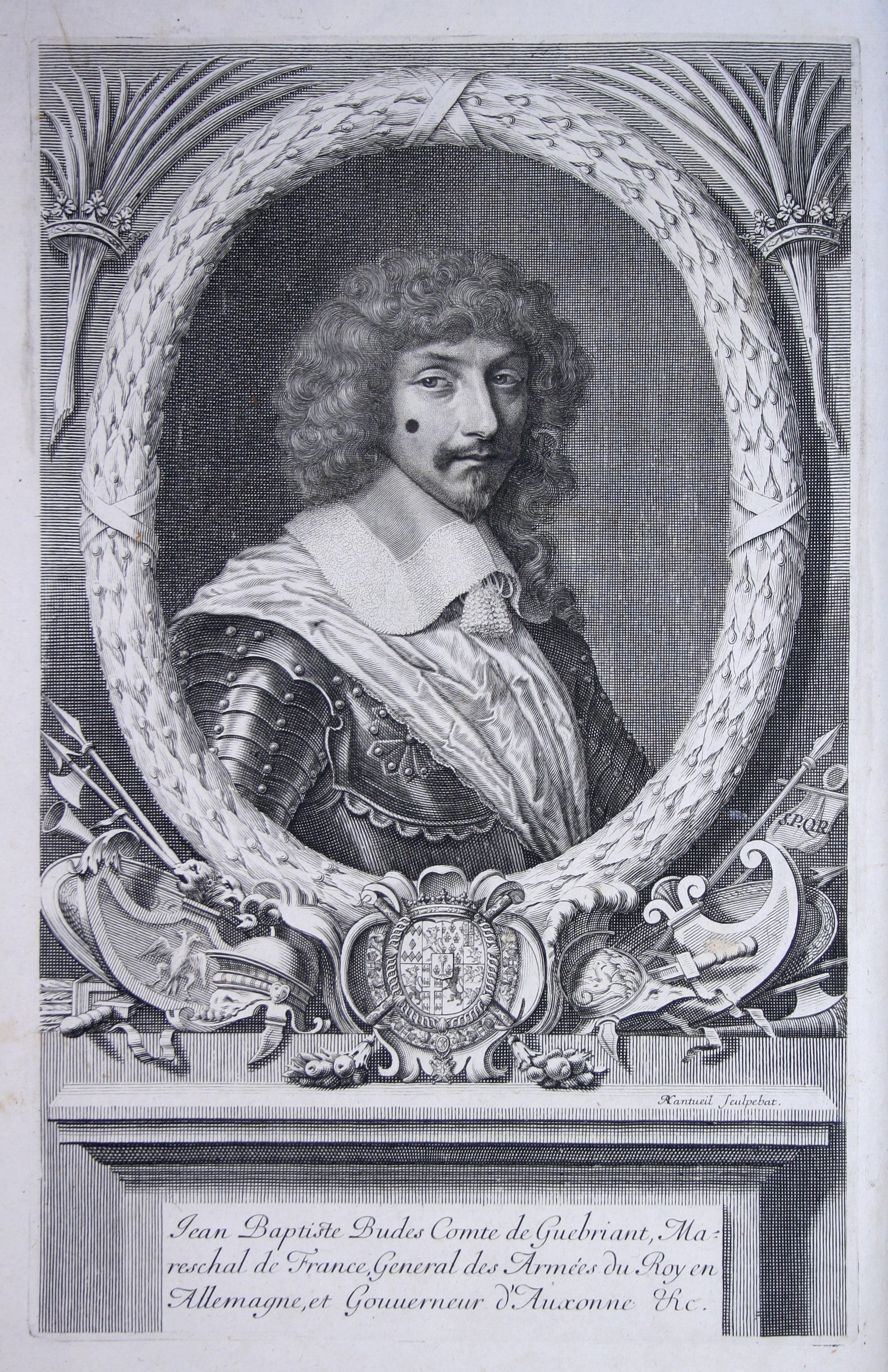 Jean-Baptiste Budes de Guébriant, frontispice de Histoire généalogique de la maison Des Budes par J Le Laboureur. 1656 Paris (exemplaire de la bibliothèque patrimoniale de Gray (France).